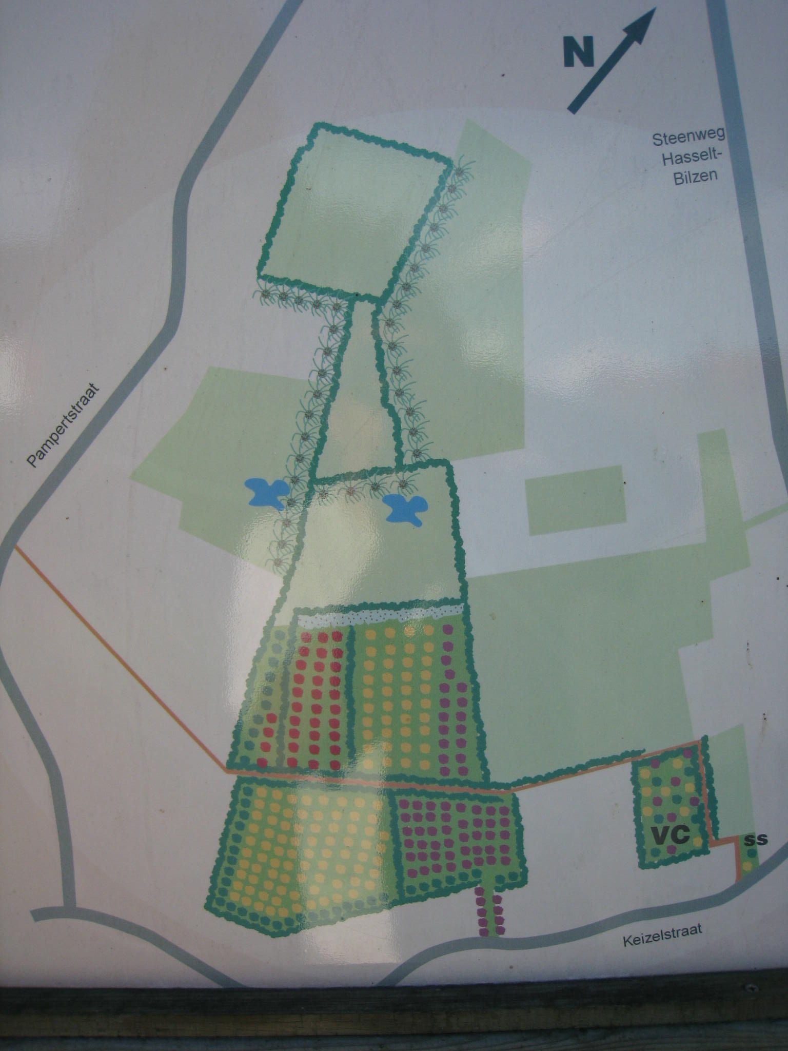 Keizelboomgaard te Diepenbeek, België